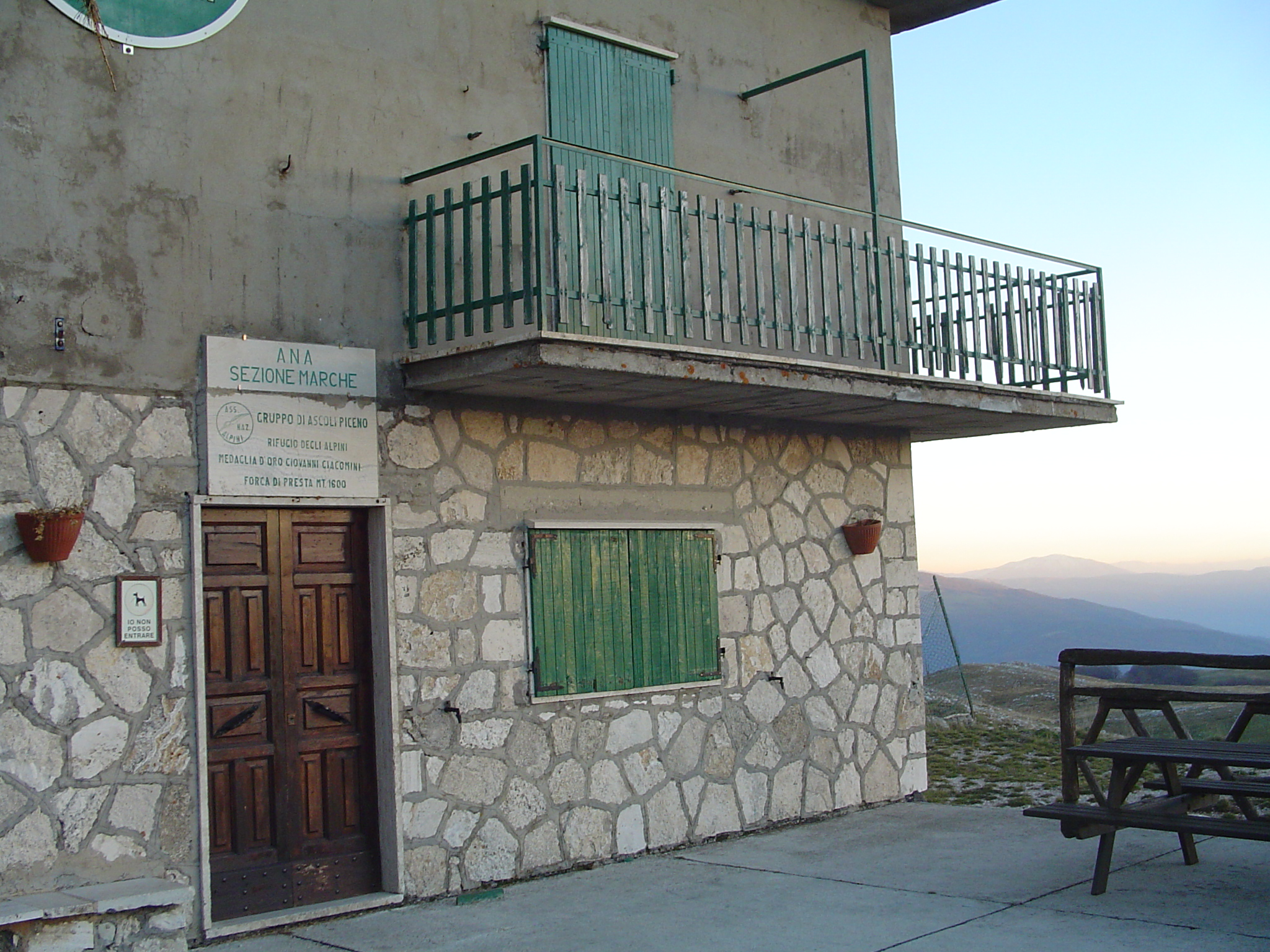 Autore: Fra105 sogetto:Il Rifugio Giacomini, o Rifugio Ana come è attualmente. 26/11/2006